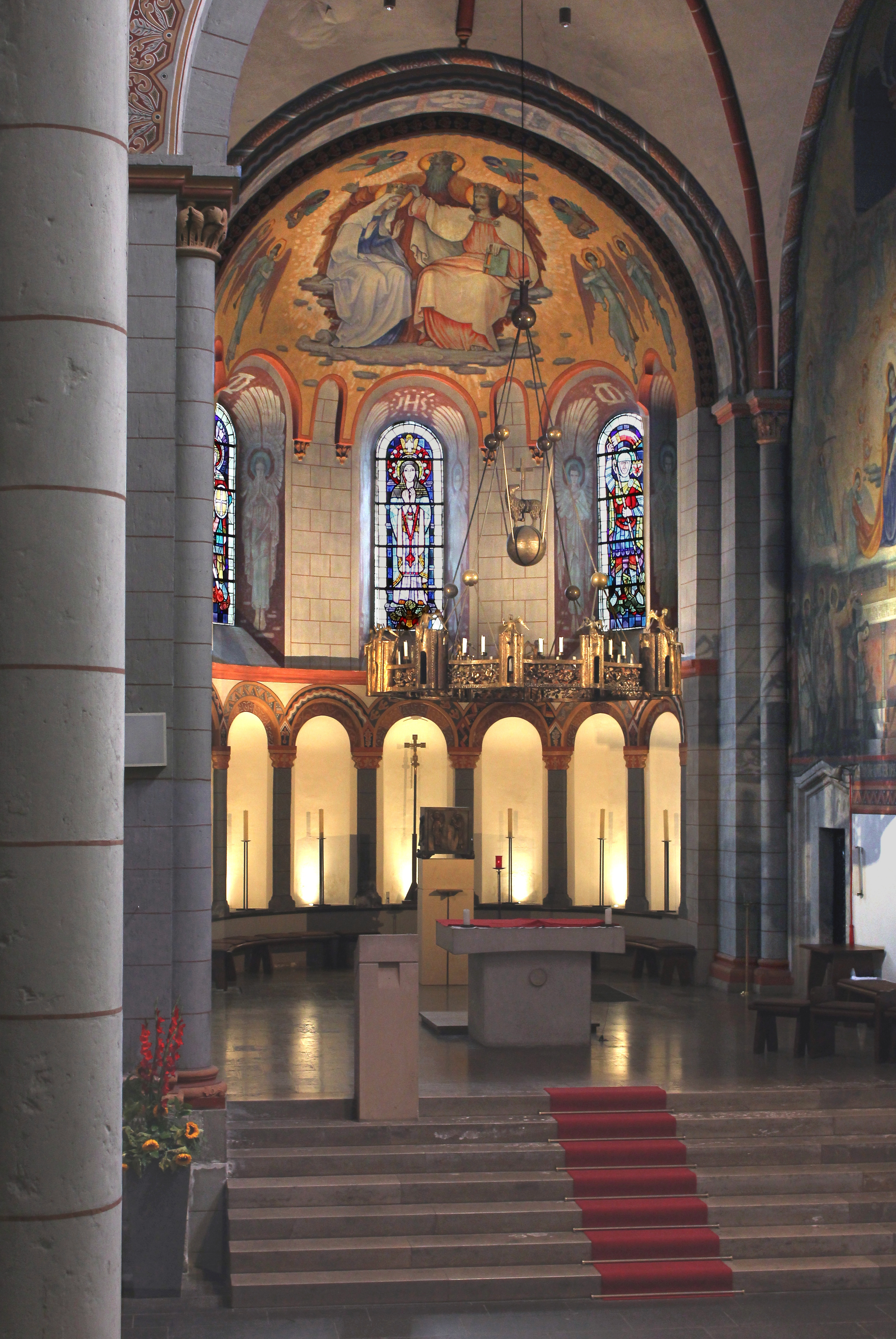 Andernach, Liebfrauenkirche, Mariendom genannt; Blick von der Kanzel in den Chor. In der Halbkuppel die Krönung Mariens, Fresko von Georg Kau, 1929